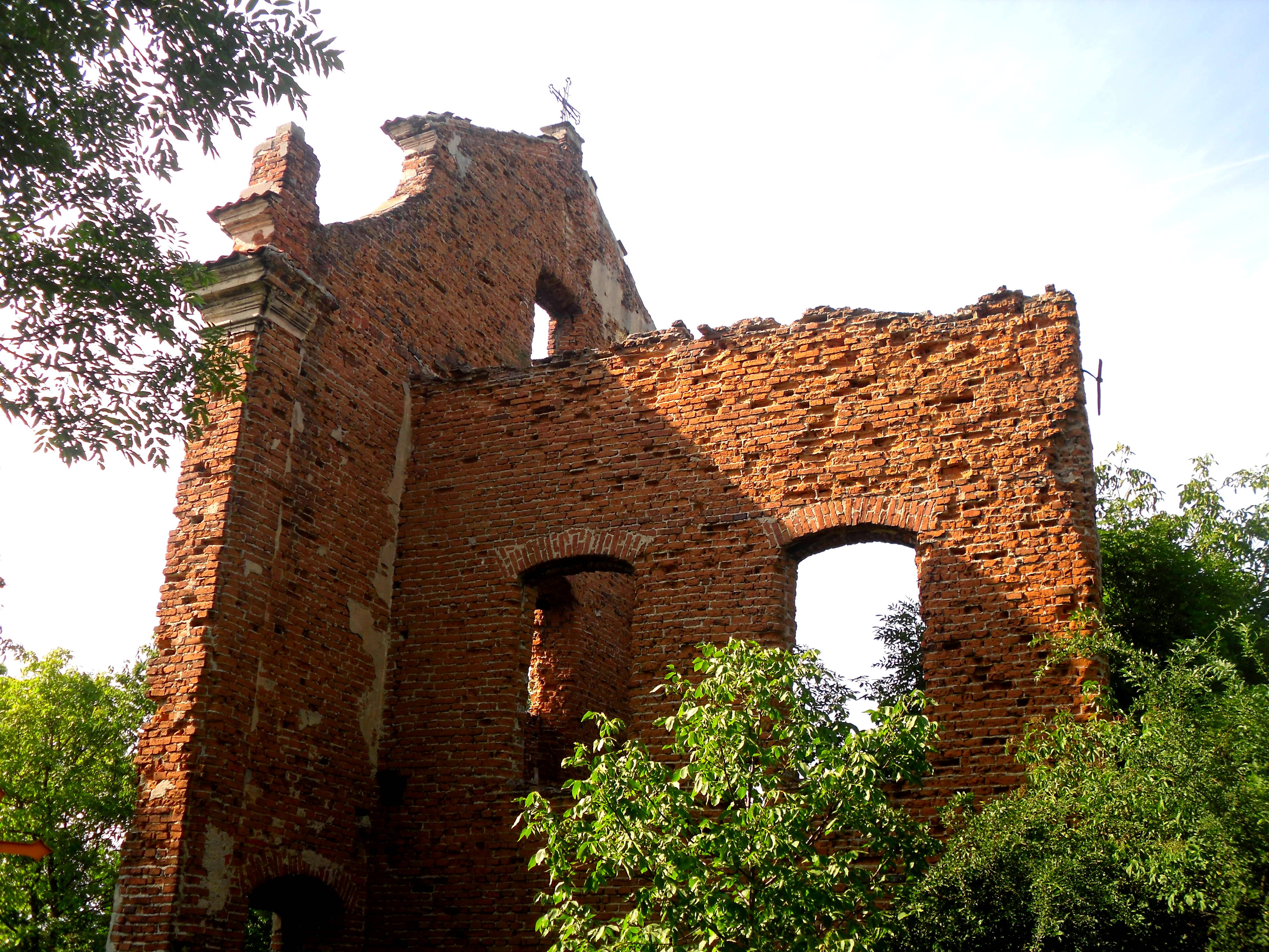 Ruiny kościoła pw. św. Wojciecha w Garbowie.